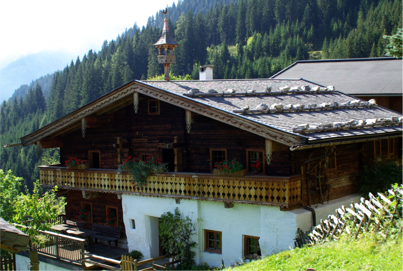 Bauernhaus, Grüneggut